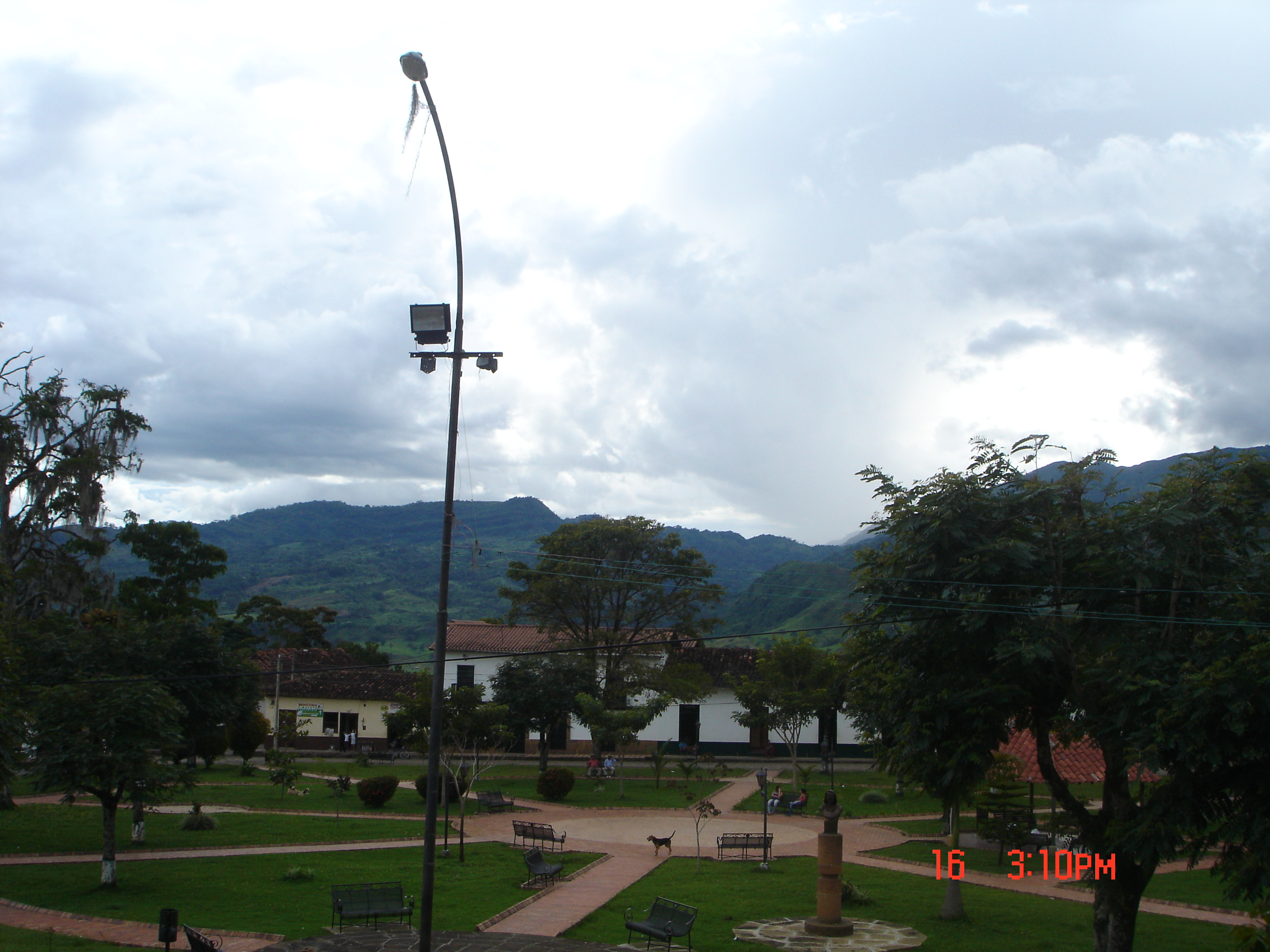 Parque Principal Simacota Santander